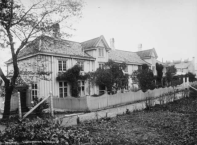 Lossiusgården, kjøpmannsgård fra 1780 i Kristiansund, fredet i 1924.